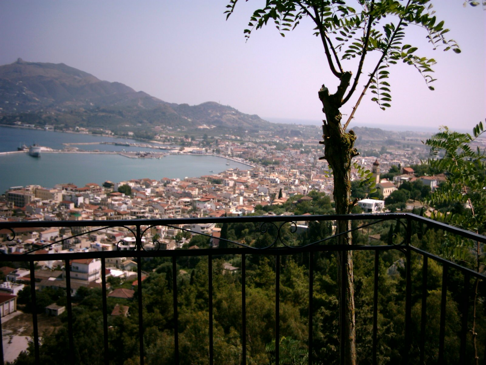 Categorie:Afbeelding stadsgezicht